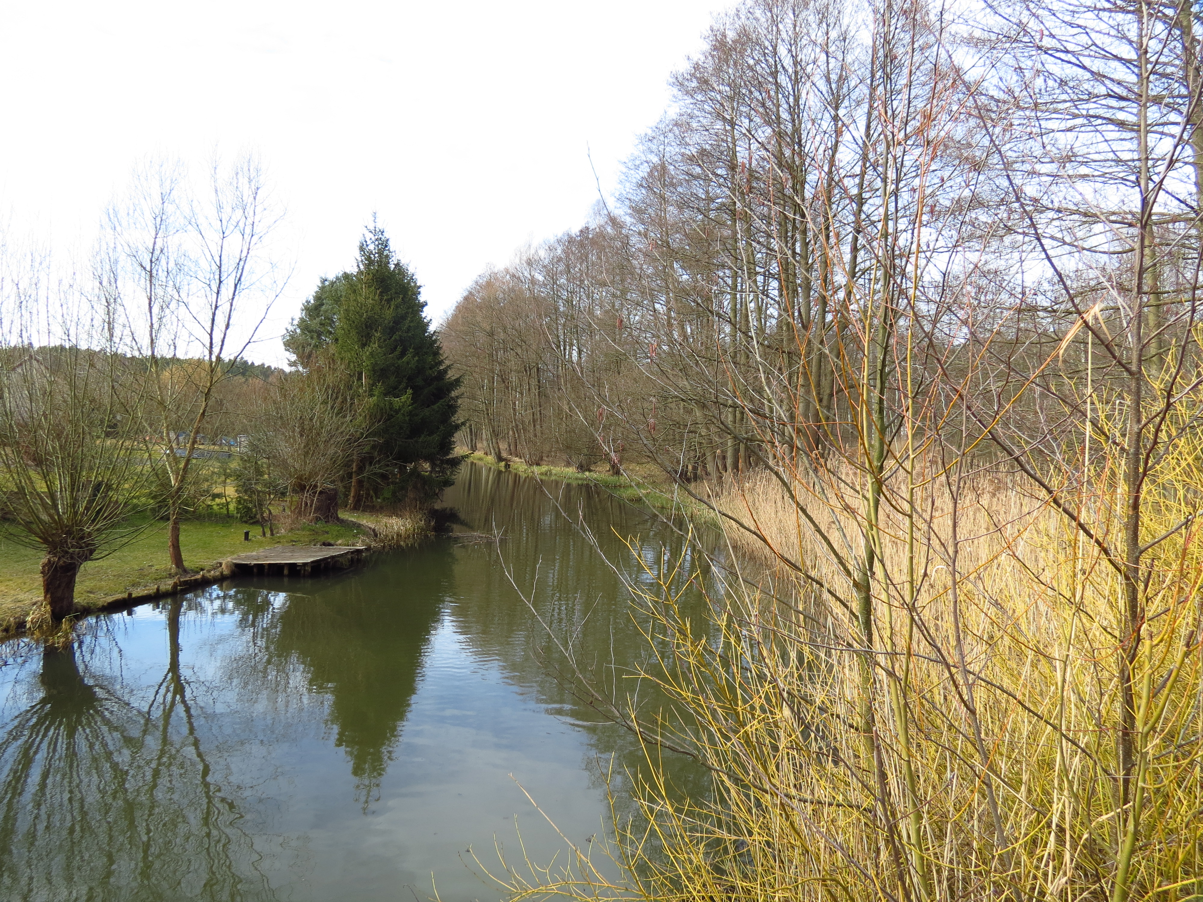 Pretschener Spree bei Pretschen, Gemeinde Märkische Heide, Lkr. Oder-Spree, Brandenburg, Deutschland